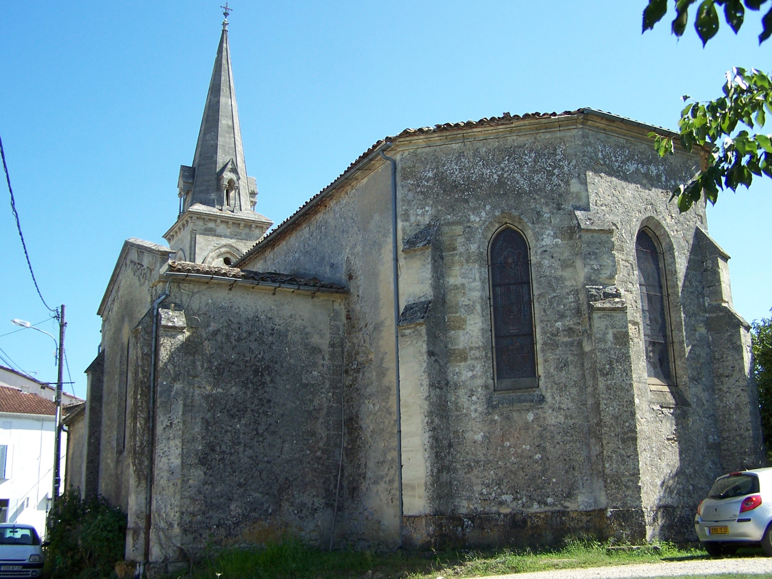 Chevet de l'église de Auros, Gironde, France